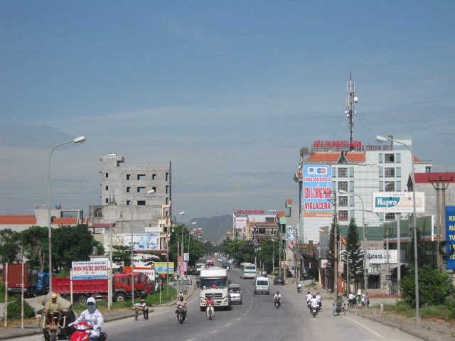 Đường Lương Văn Thăng - thành phố Ninh Bình nhìn từ cầu Non Nước